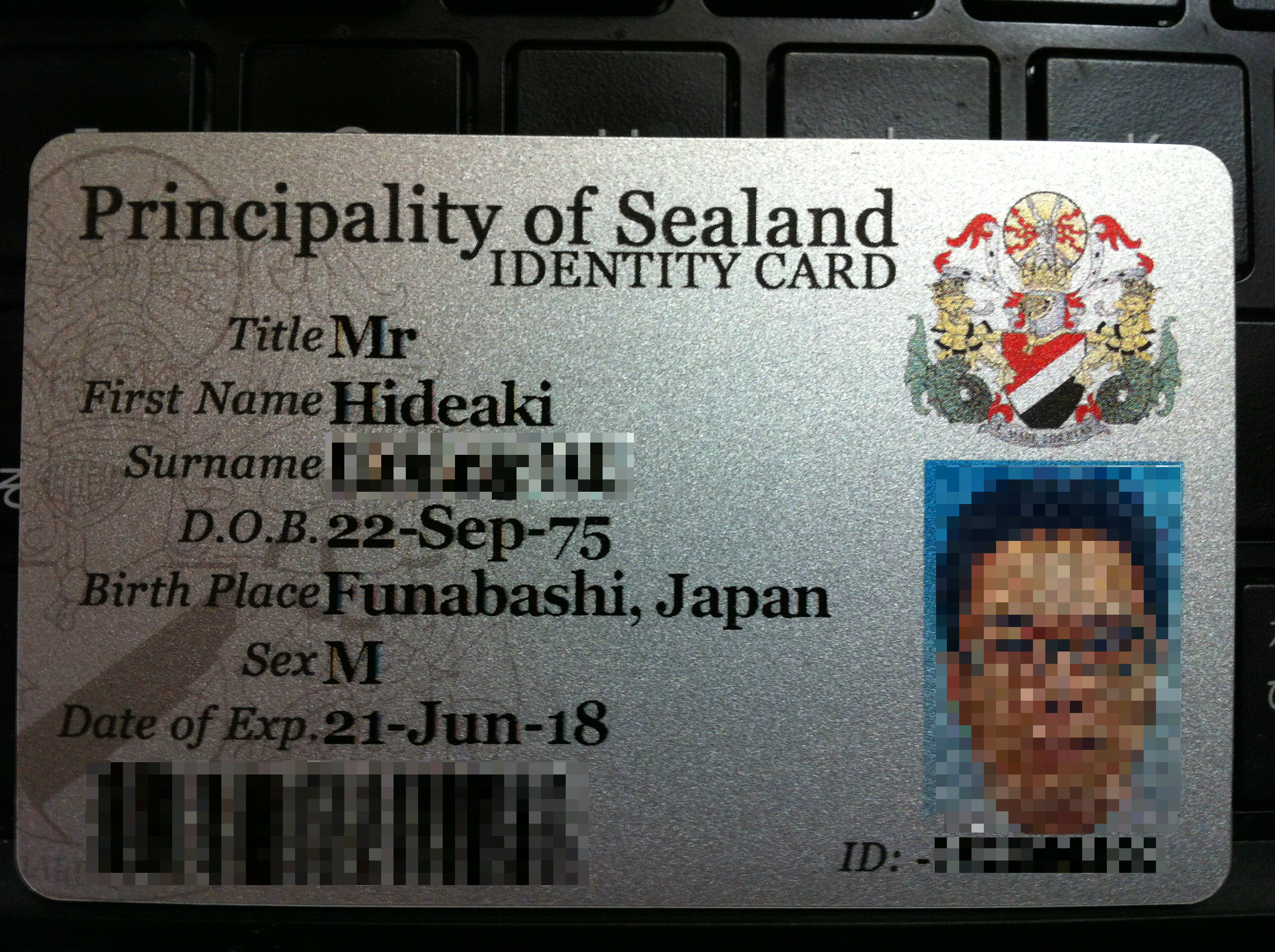 シーランド公国のID(2013年６月発行)。